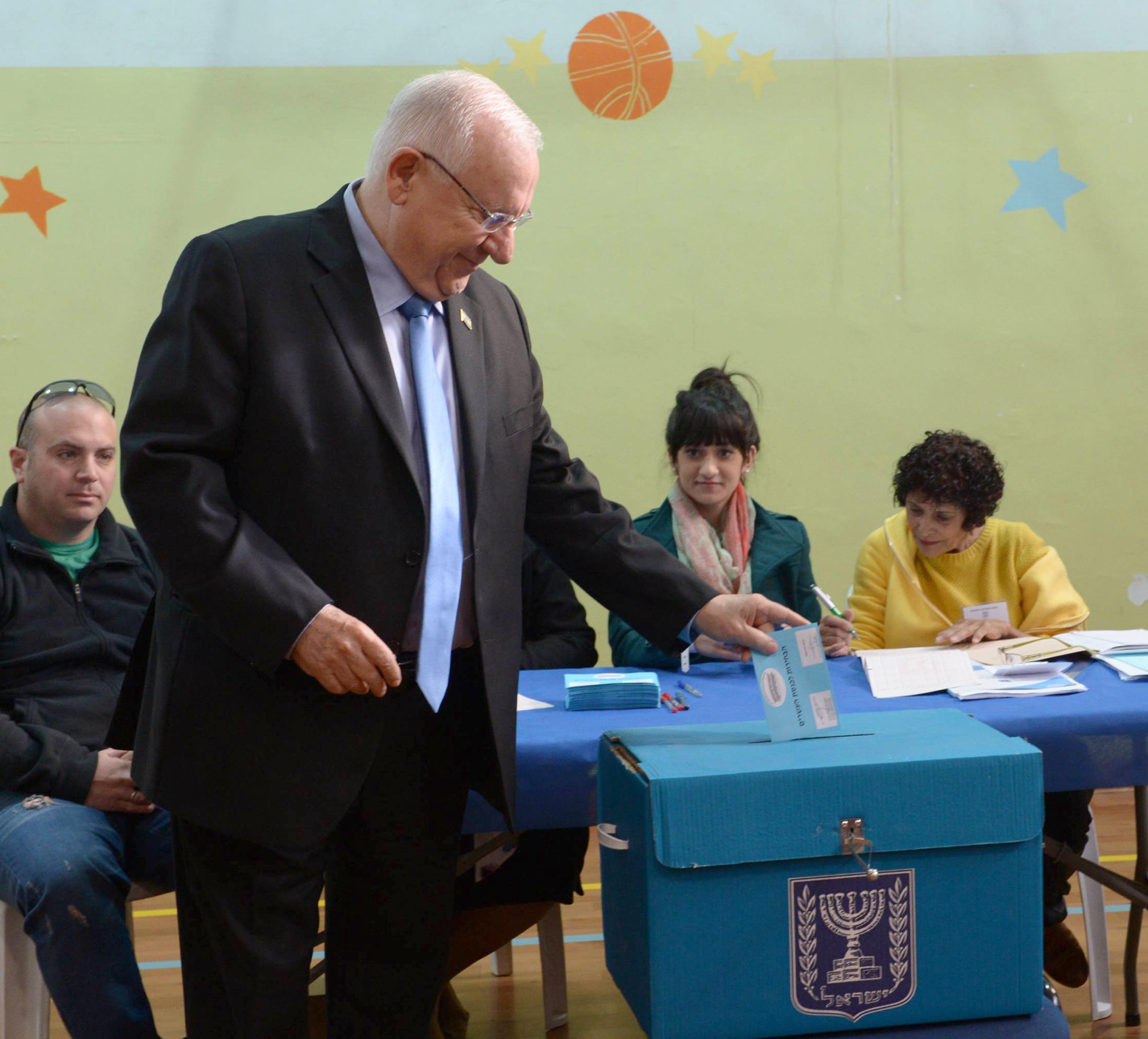 נשיא מדינת ישראל ראובן ריבלין מצביע בבחירות מרץ 2015 בקלפי המוצבת בבית הספר ״יפה נוף״ בירושלים.